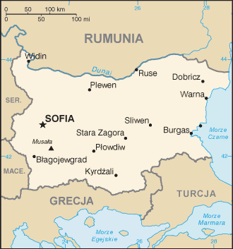 Mapa Bułgarii na podstawie CIA World Factbook